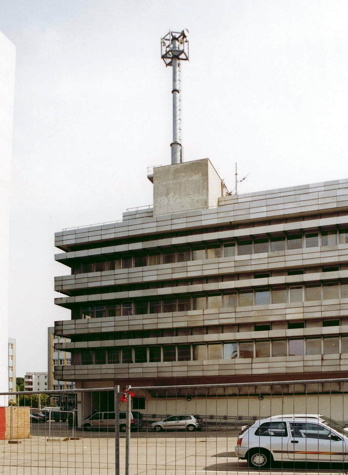 Ministerium für Staatssicherheit der DDR: Haus 43, Hauptsitz der Abteilung Nachrichten (Abt. N) in Berlin-Lichtenberg, Gotlindestraße